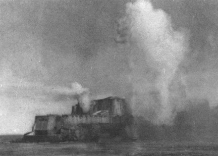 Bombardeo del Castillo del Morro (Sab Juan de Puerto Rico) durante la Guerra Hispano-estadounidense (1898)